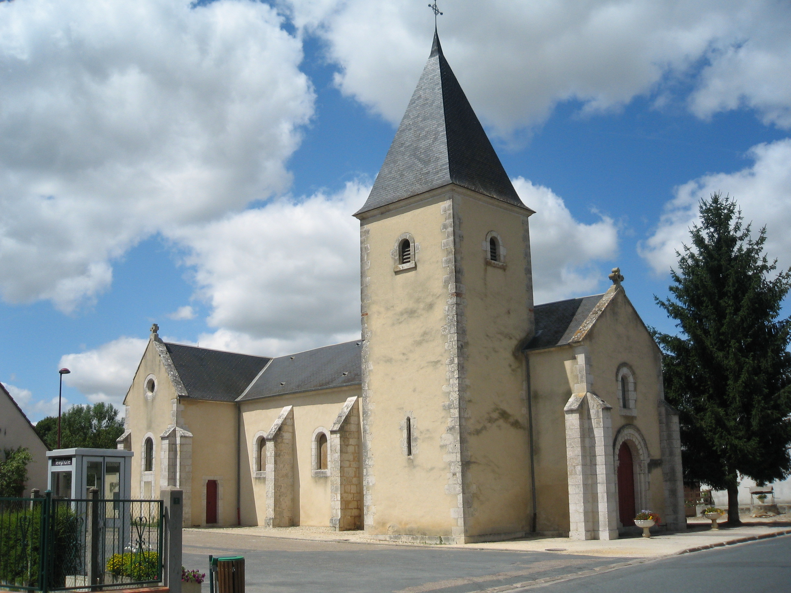 Eglise de Villeneuve sur Cher, département du Cher